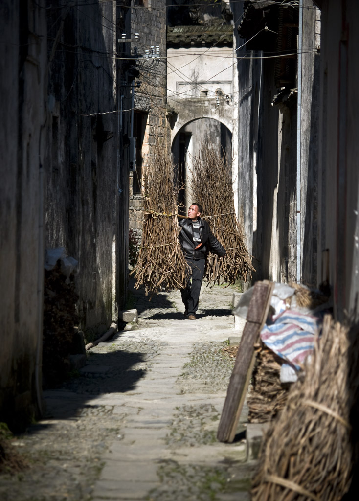 挑着柴火的人